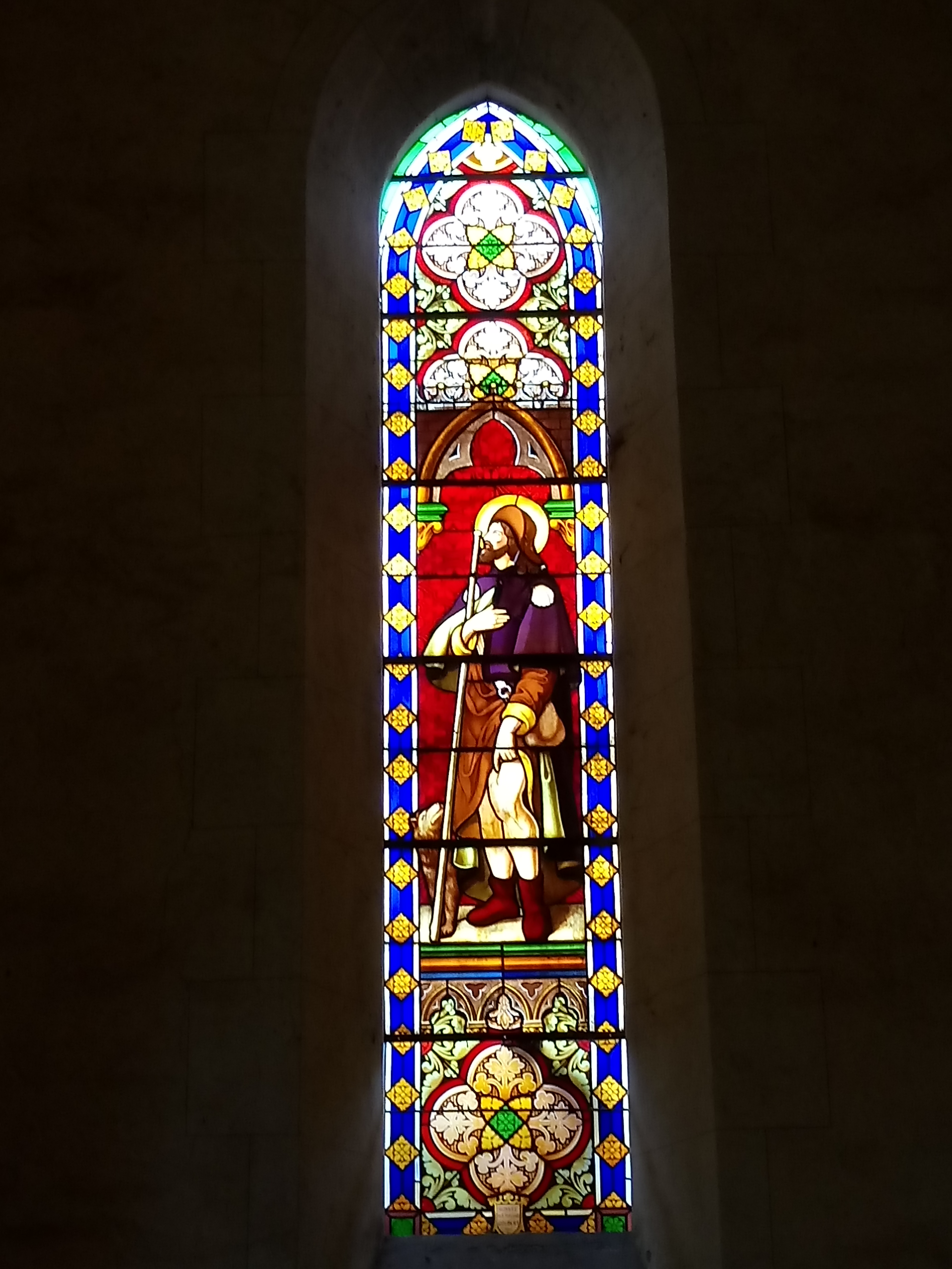 Restauration effectuée en 2019 par Bernadette SOUFFLET